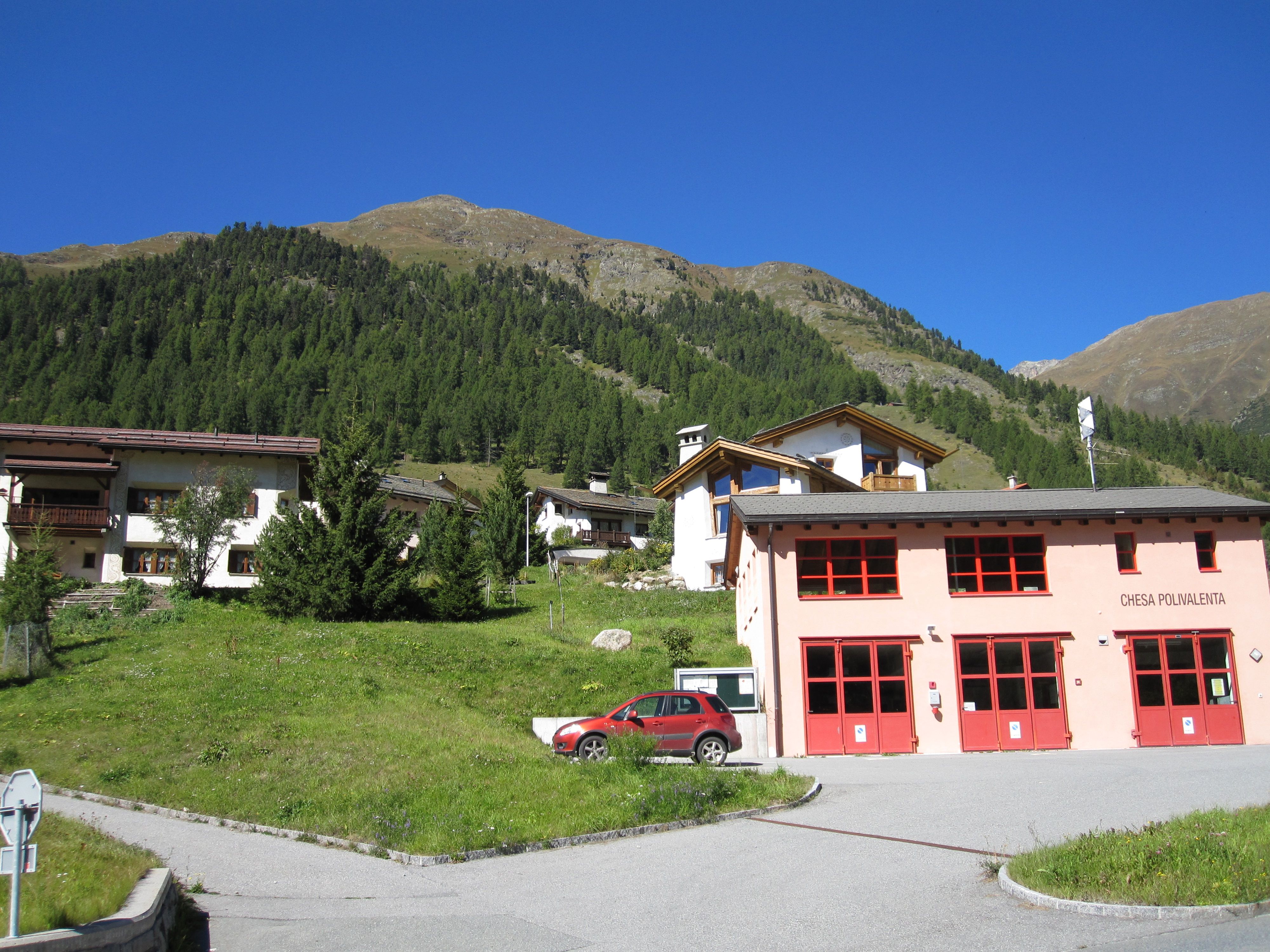 Mehrzweckhalle in Brail (politisch zu Zernez gehörig)